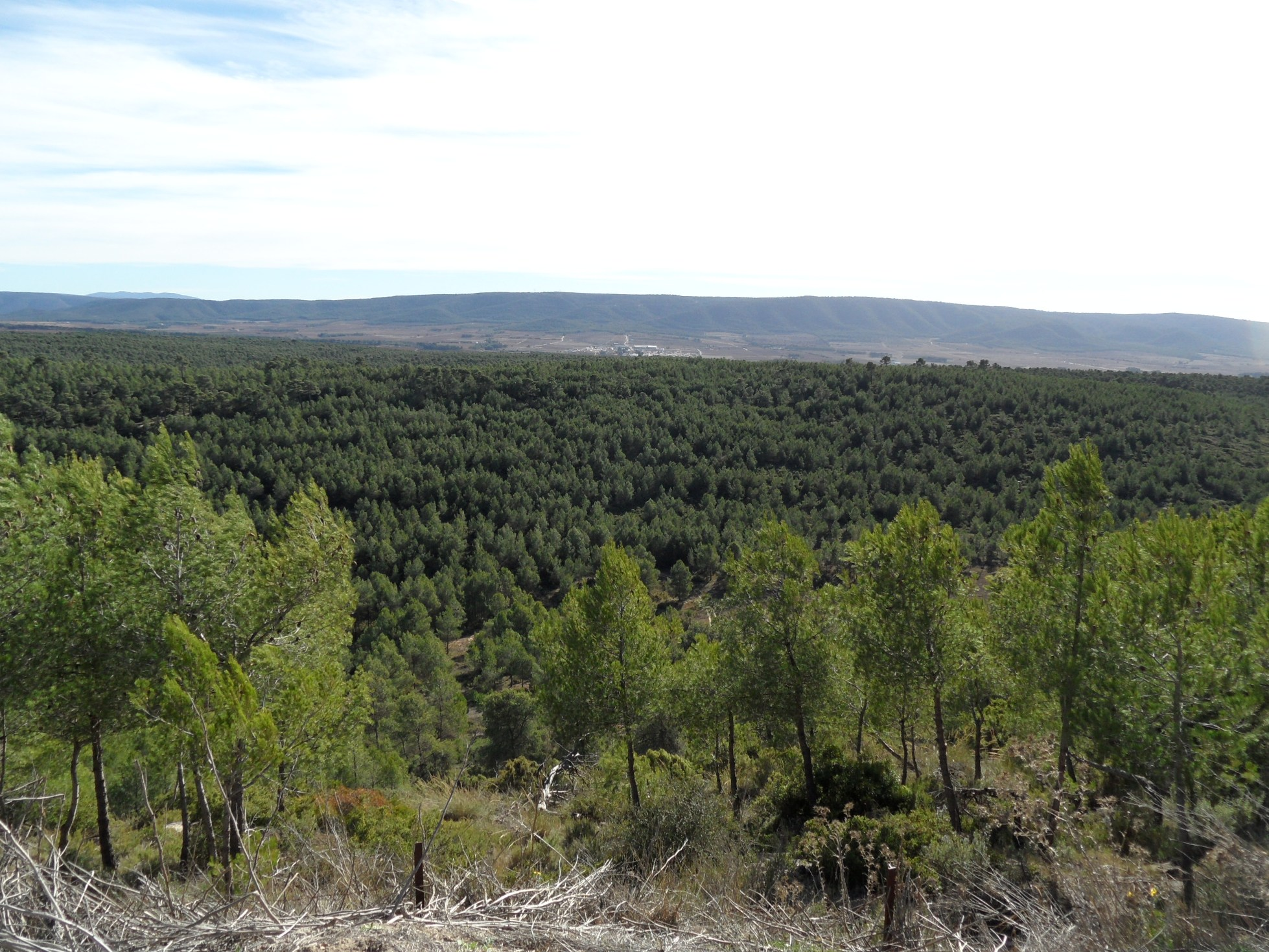 Els Alforins des de la porta sud.